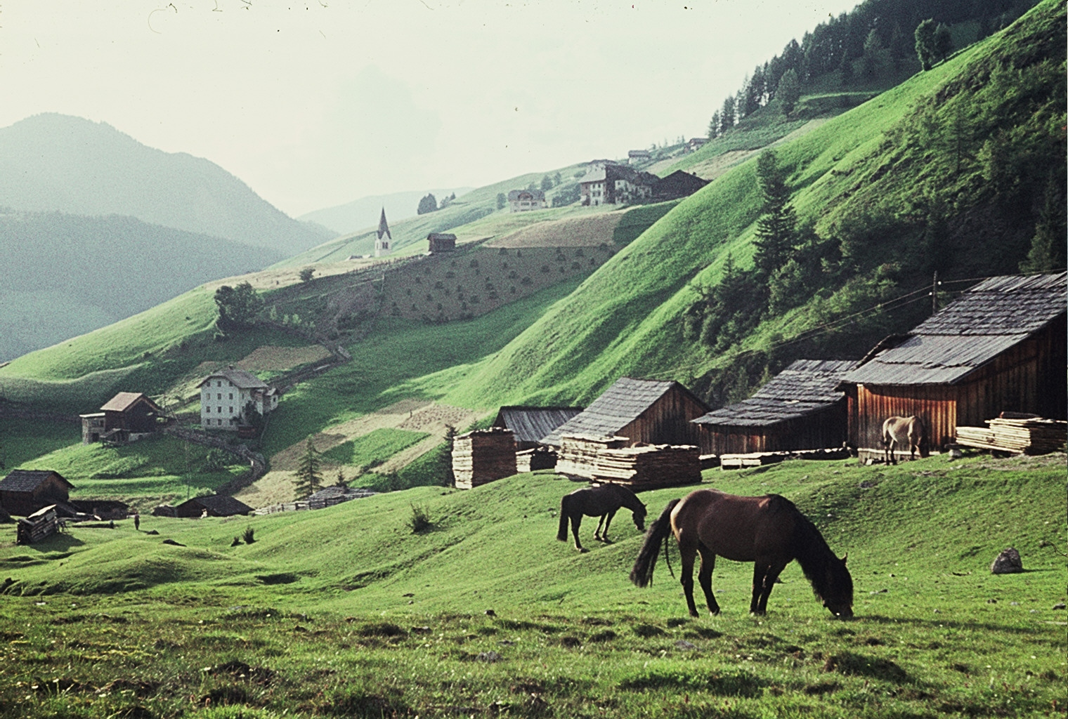 Wengen, Planz